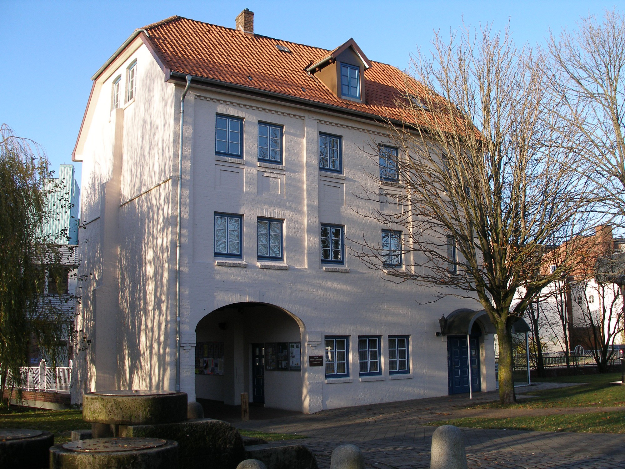 Torhaus Elmshorn, ehemaliges Fabrikgebäude von 1918, Foto: 2007. Das Objekt war vor 2015 Kulturdenkmal.